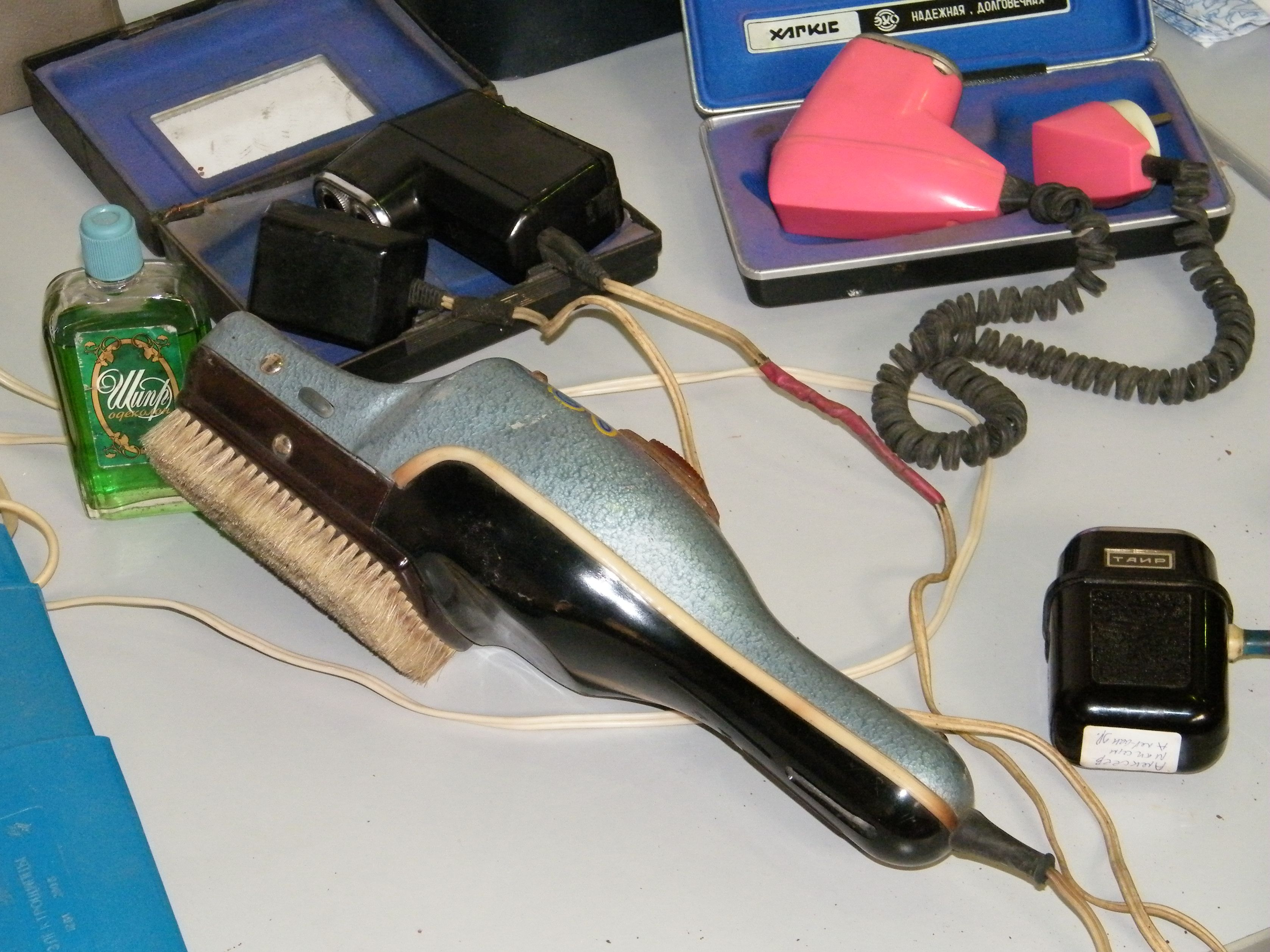 Пылесос-щётка "Ветерок", одеколон "Шипр" и советские электробритвы 1980-х годов.